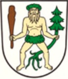 Blazono de Grabs, Kantono Sankt-Galo